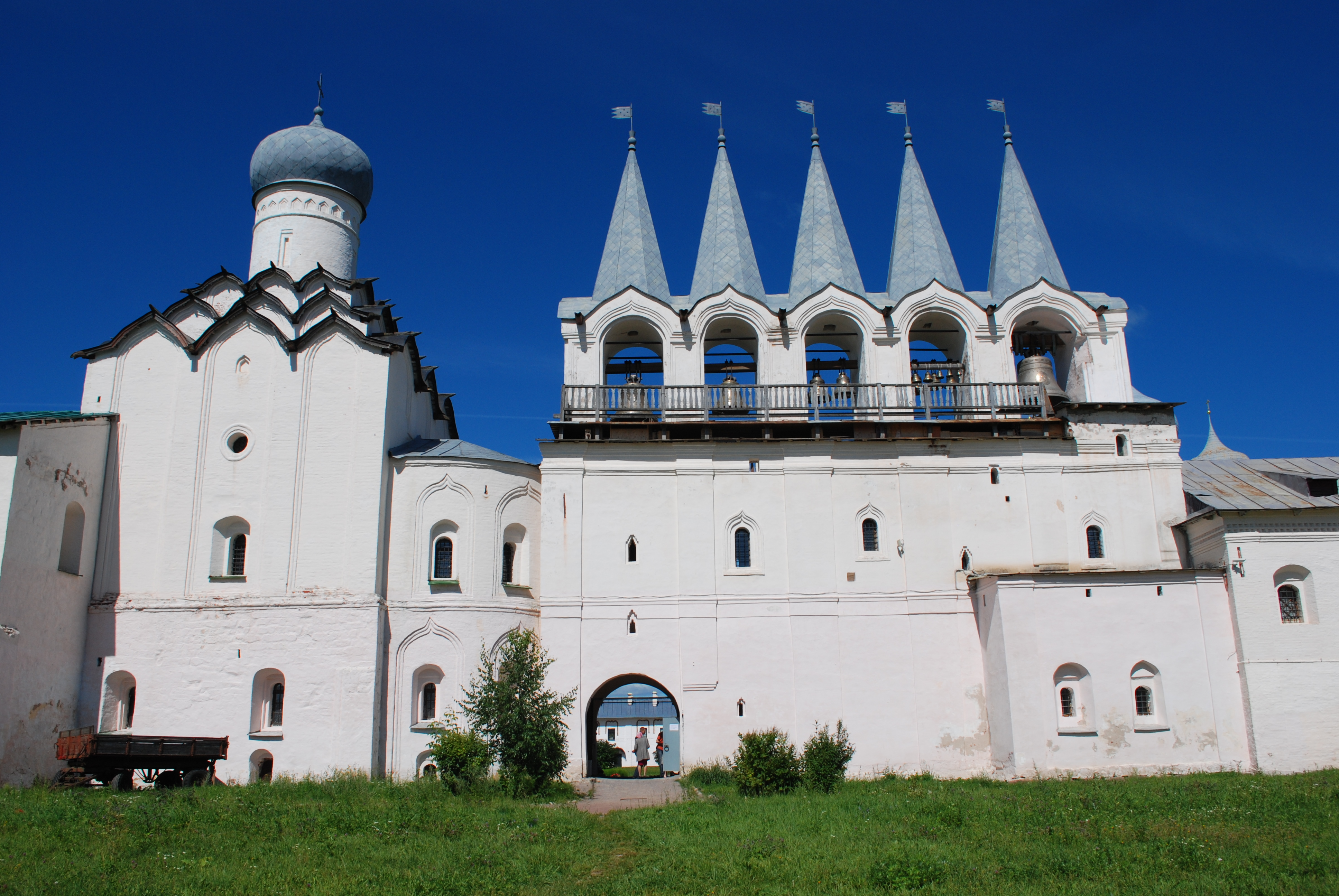 Трапезная палата с церковью Покрова Божьей Матери (Санкт-Петербург и Лен.область, Тихвин, Тихвинская улица, 6-11)